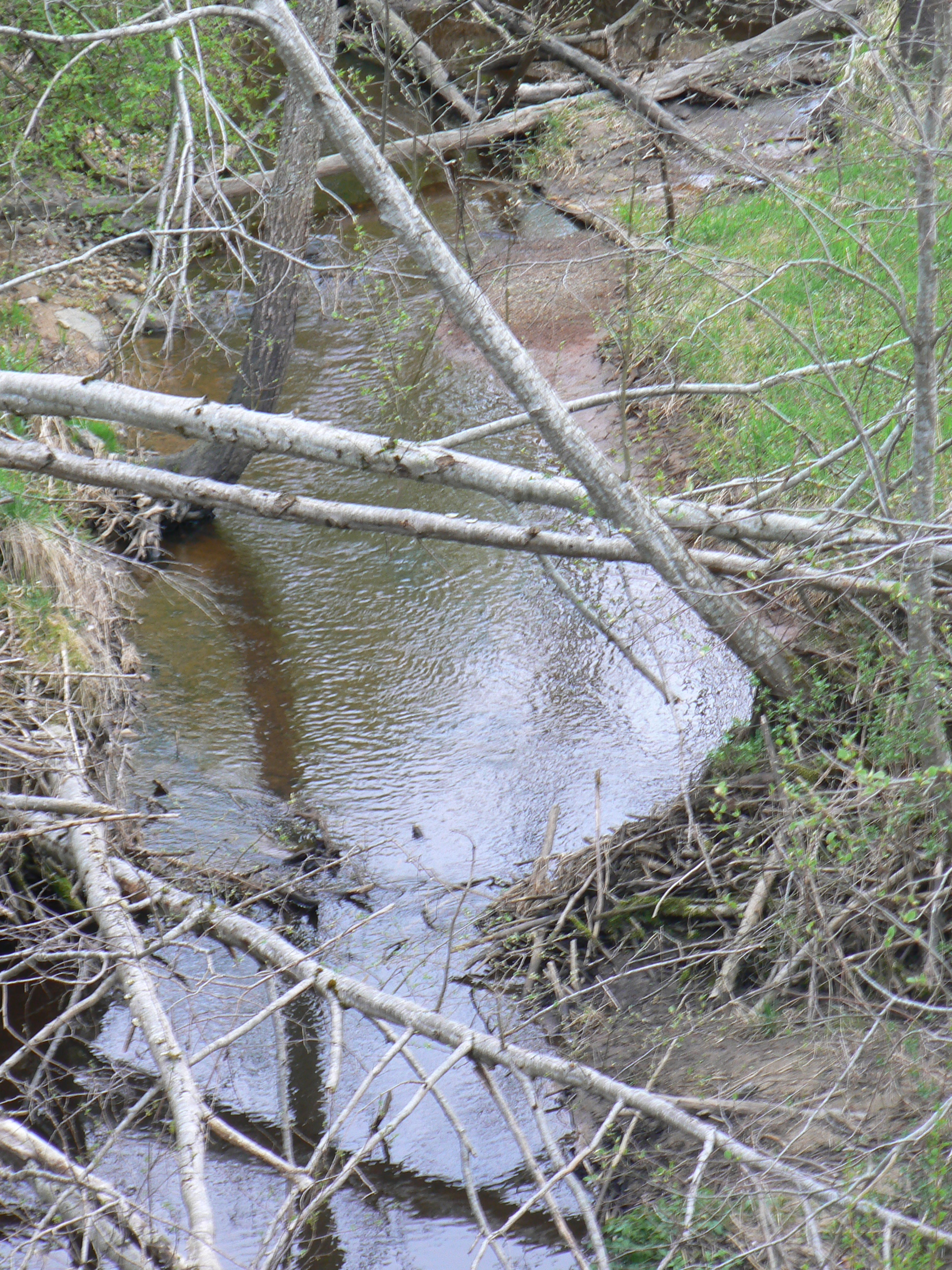 Vieštovė po proudu. Pohled z mostu silnice č. 166 k severu.